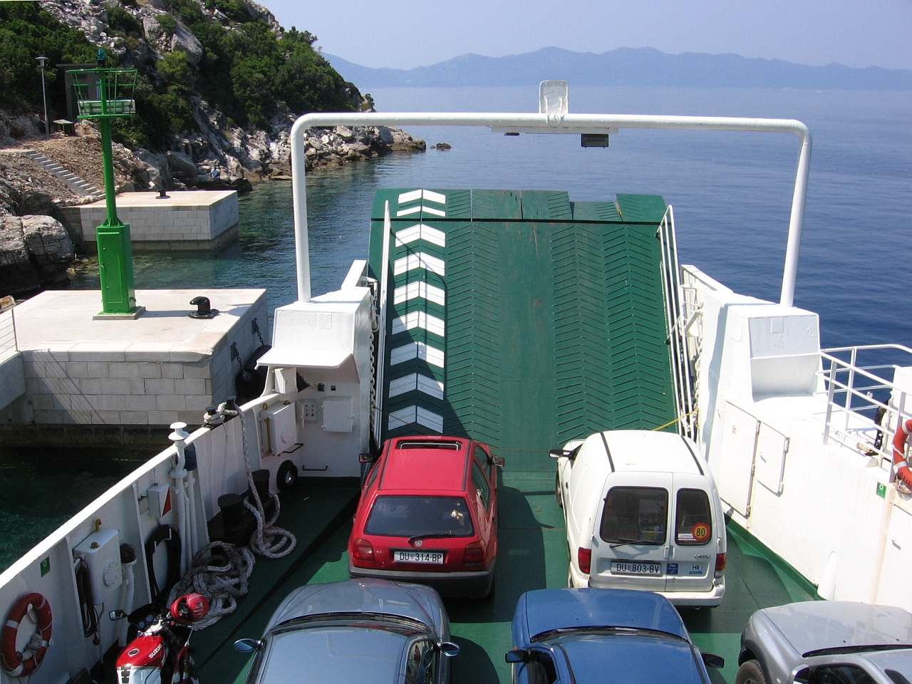 Jadrolinija ferry - ready to departure from Prapratno (Pelješac peninsula) to Sobra (Mljet island)